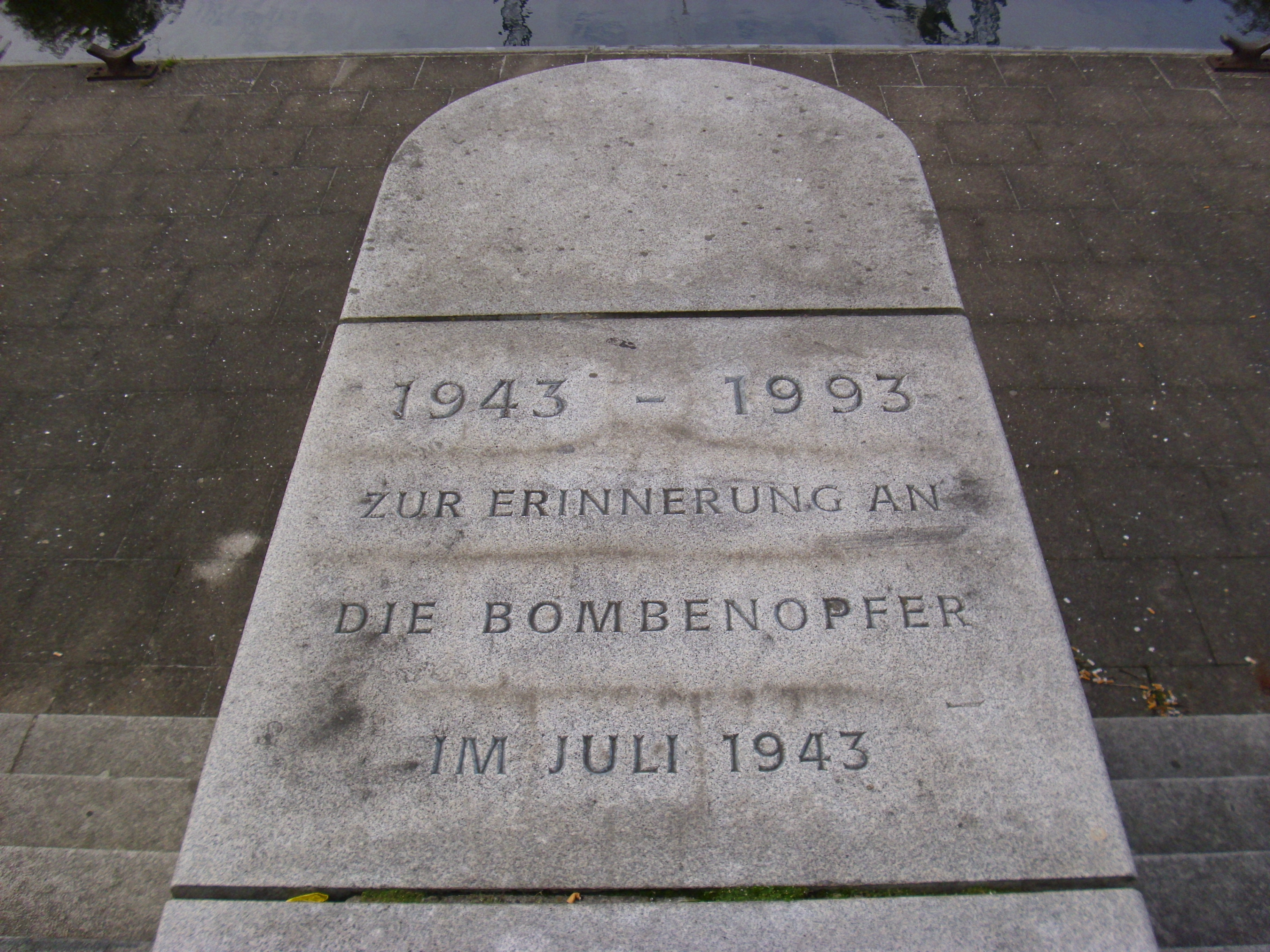 Gedenkplatte zur Erinnerung an die Bombenopfer im Juli 1943 am Südufer des Mittelkanals auf Höhe des Heinrich-Grone-Stiegs in Hamburg-Hammerbrook